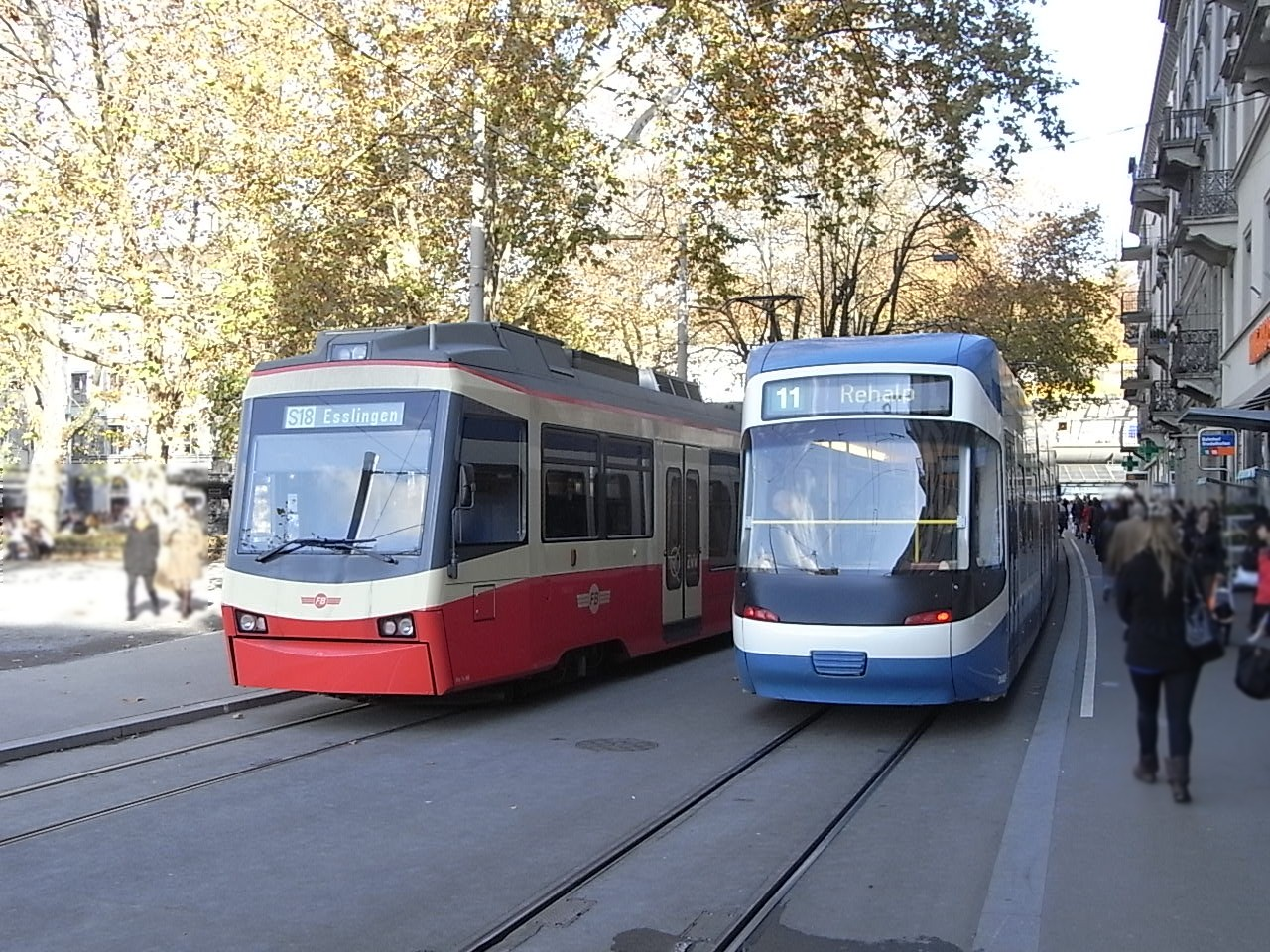 Forchbahn und Tram 11 in Zürich Stadelhofen.